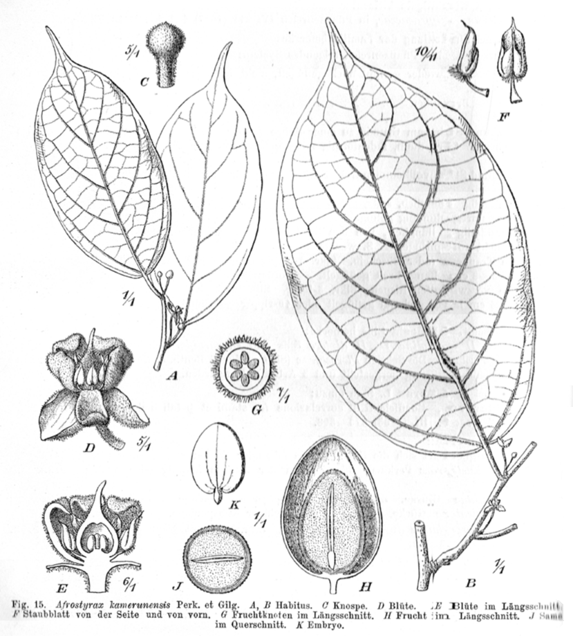 Afrostyrax kamerunensis Legende: A, B: Habitus C Knospe D Blüte E Blüte im Längsschnitt F Staubblatt von der Seite und von vorn G Fruchtknoten im Längsschnitt H Frucht im Längsschnitt J Samen im Querschnitt K Embryo